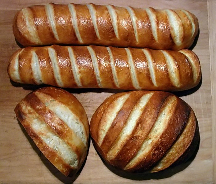 Four loaves.